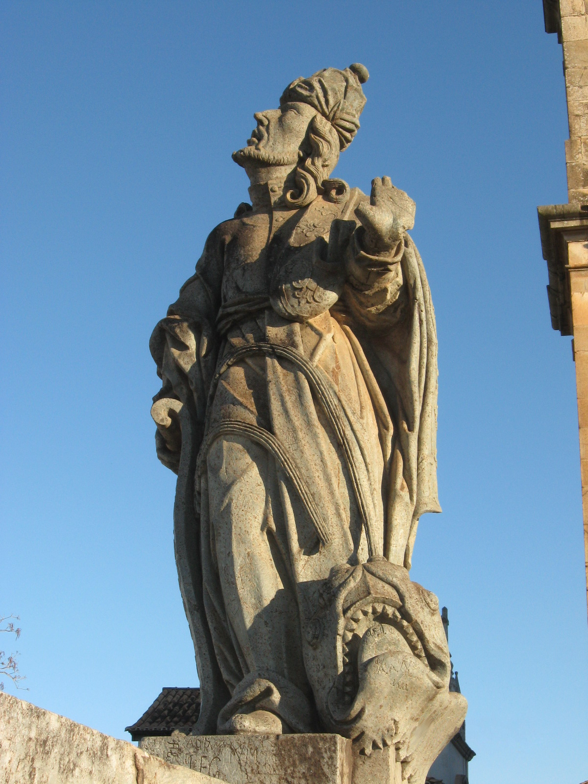 Profeta Jonas - Doze profetas de Aleijadinho